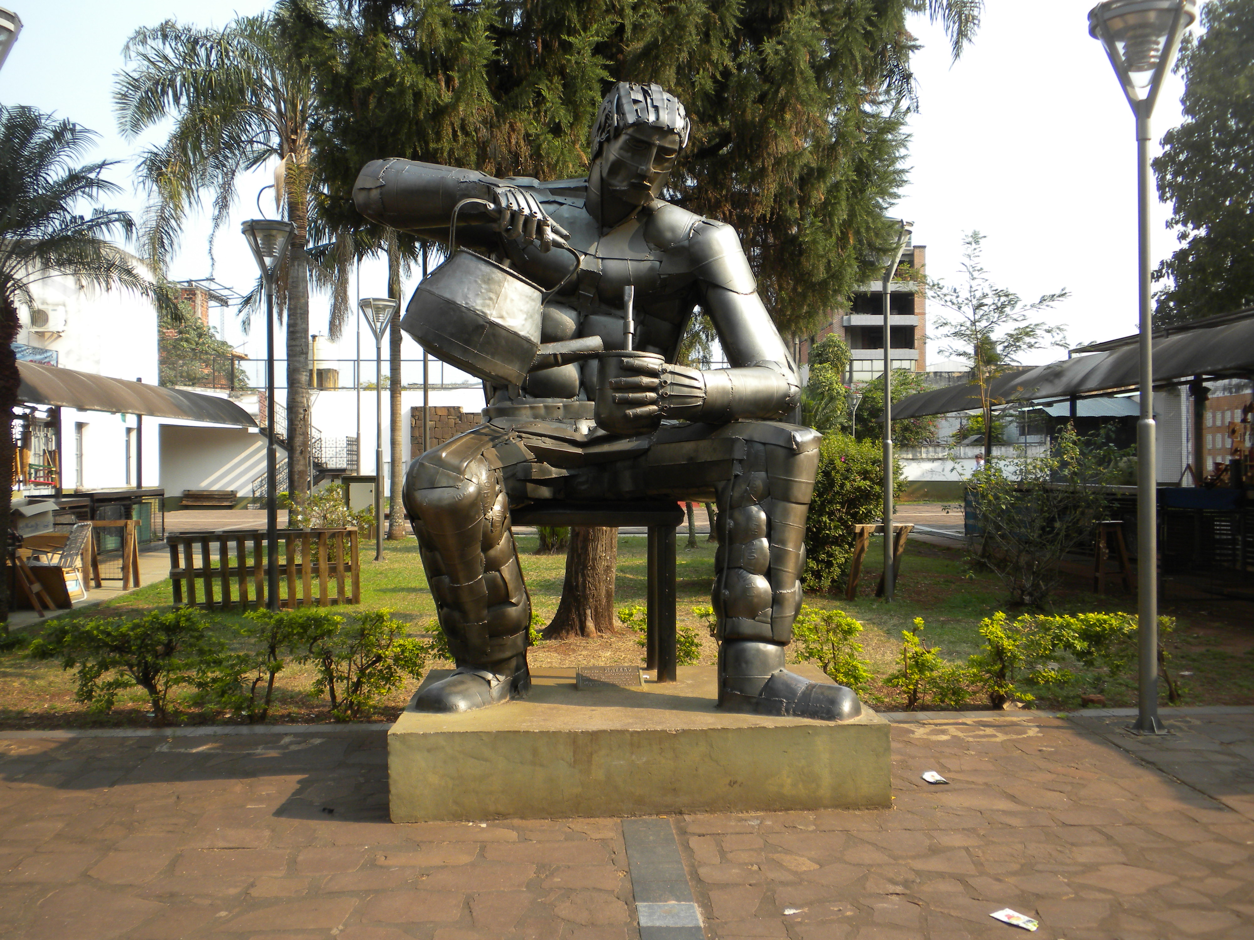 Paseo Bosetti - Posadas, Provincia de Misiones, Argentina. Fuenteː Periodista Horacio Cambeiro.